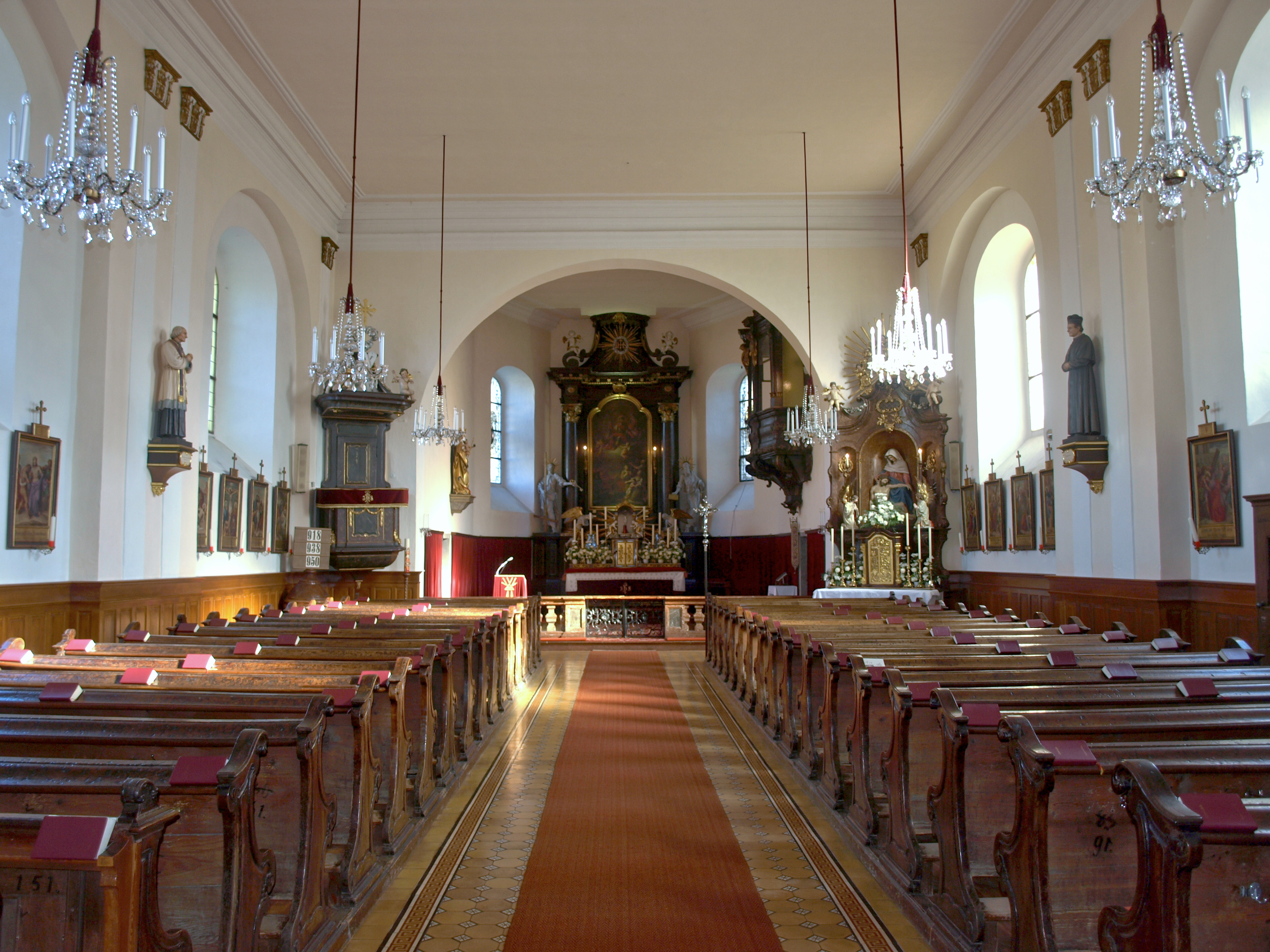 Kath. Pfarrkirche hl. Florian